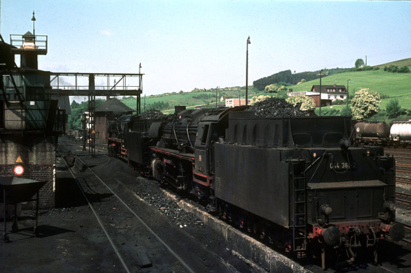 Dampflokomotiven der Baureihe 044 im Bahnbetriebswerk Ottbergen Sonstiges: es gibt keine anderen Versionen dieses Bildes